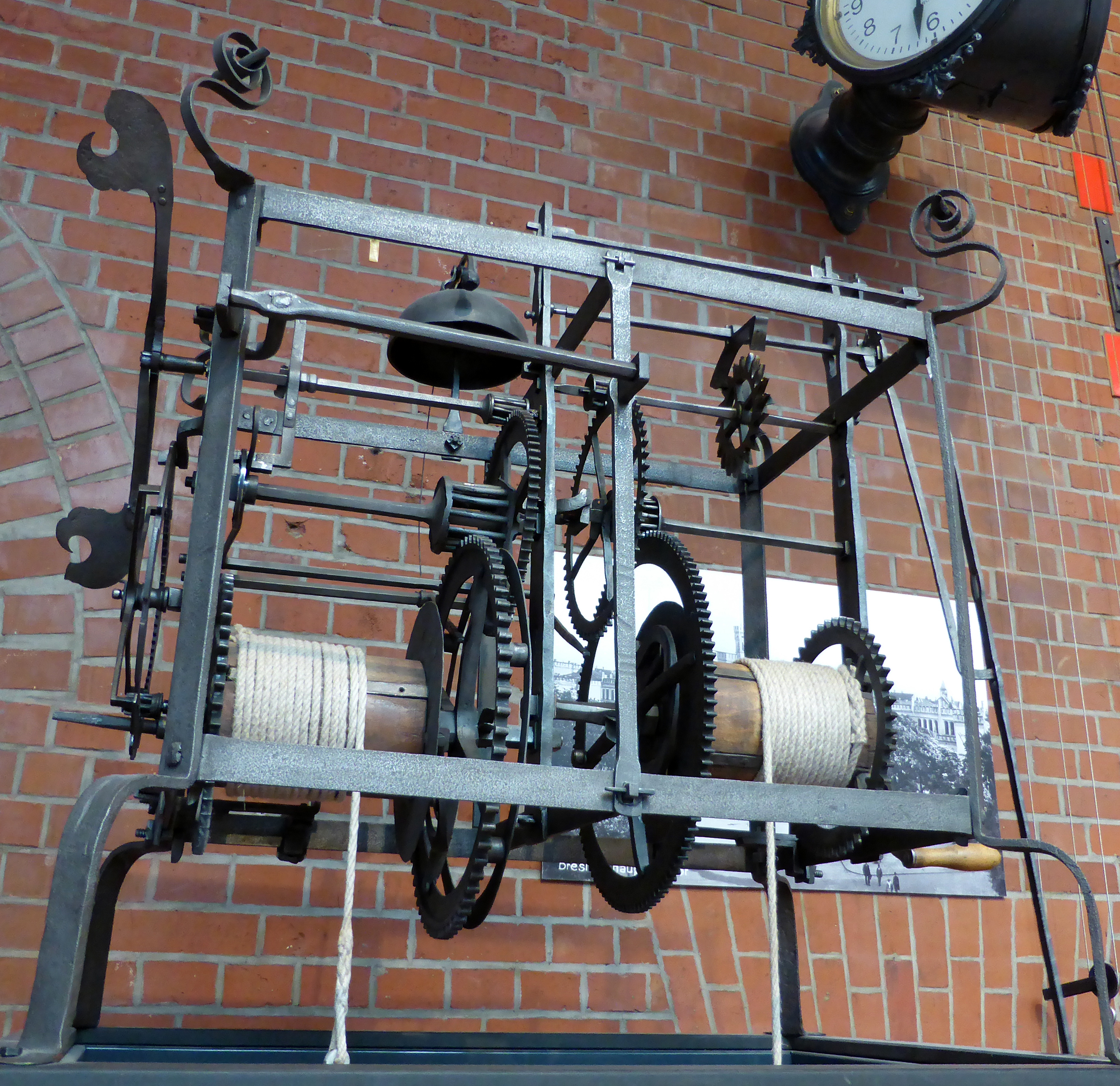 Turmuhr mit Schlagwerk, vermutlich 18. Jahrhundert (Schmiedeeisen mit Gewichtsuhrwerk). Ausgestellt im Deutschen Technikmuseum Berlin. Wikipedianische KulTour am 10. Oktober 2015 in der Ausstellung des Museums.